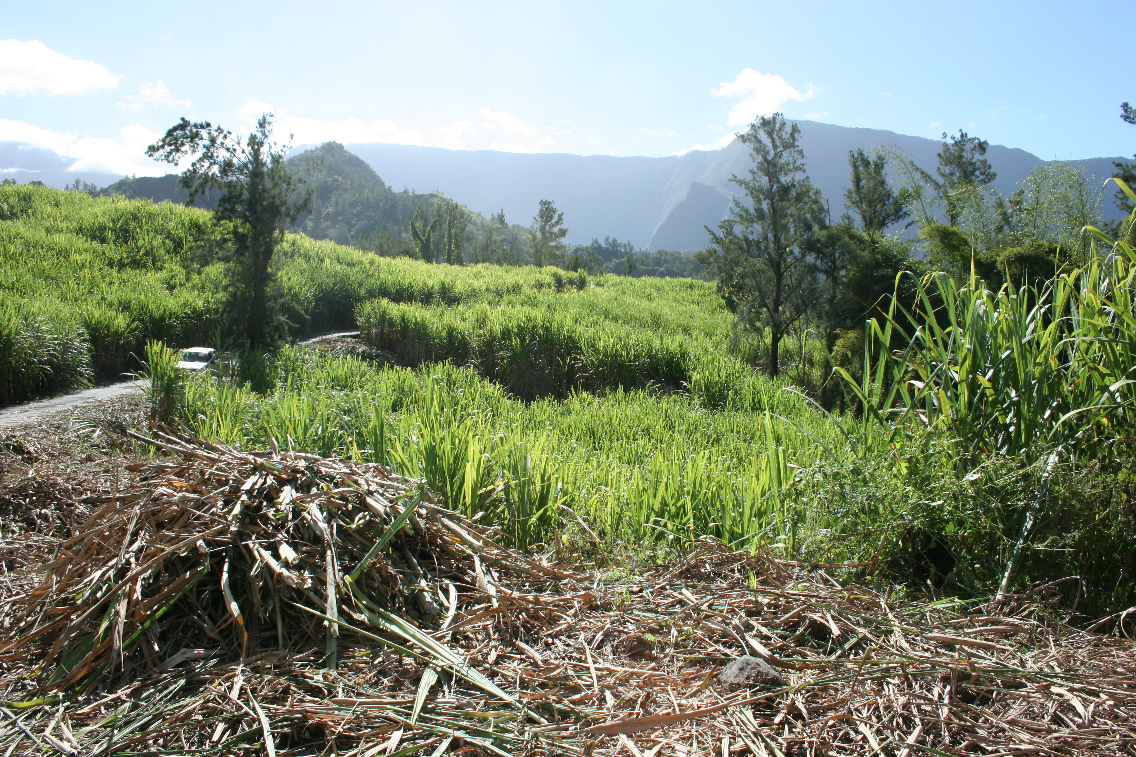 Un champ de cannes à sucre à Salazie, dans les Hauts de la Réunion